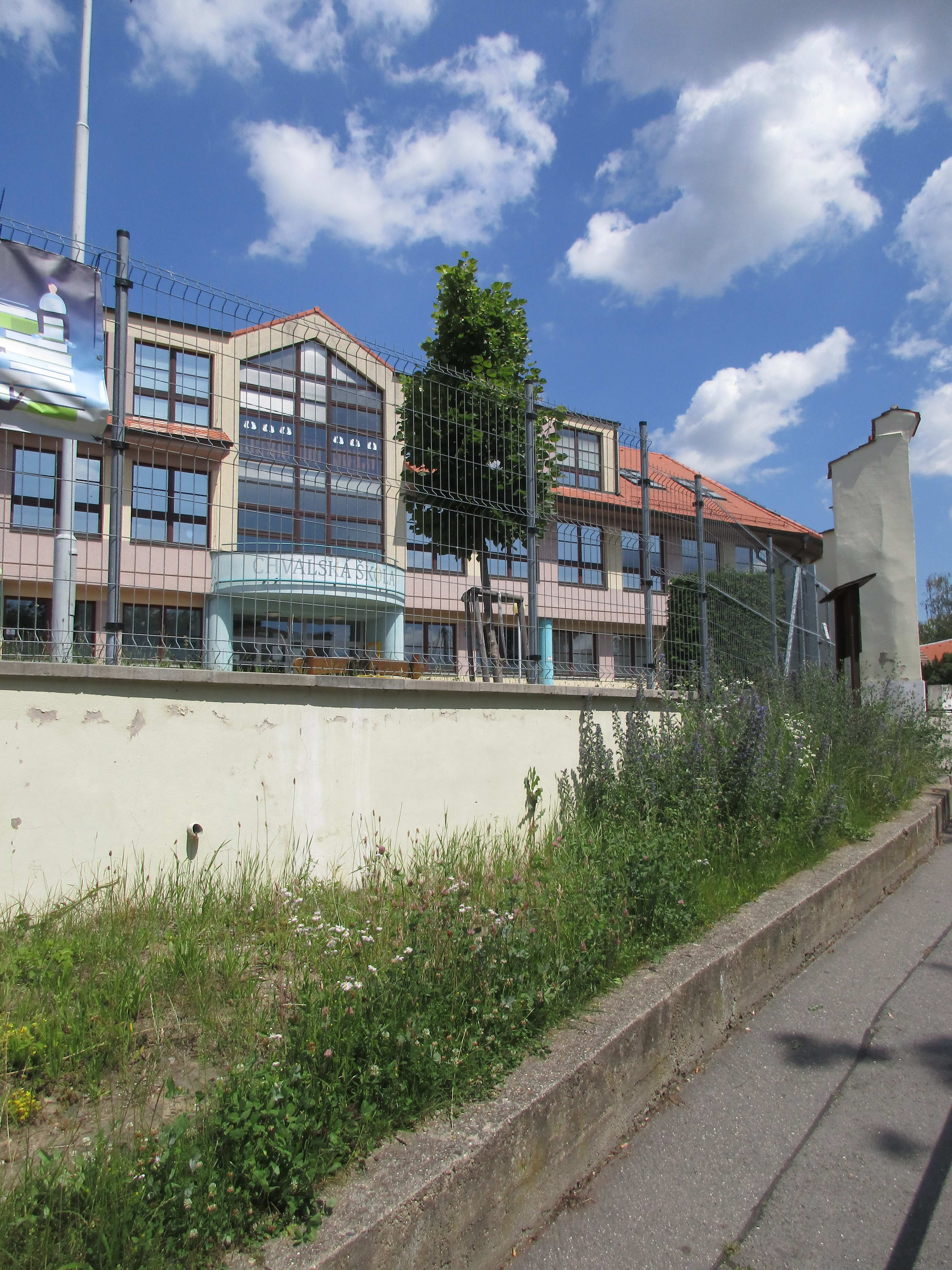 Lípa malolistá "(Tilia cordata)". Praha 9 - Horní Počernice, Chvaly, Stoliňská 823. Vysazena 24. října 2013 na památku 95. výročí vzniku Československé republiky. Významný strom, evidenční číslo MHMP: 77, v databázi od roku 2018.